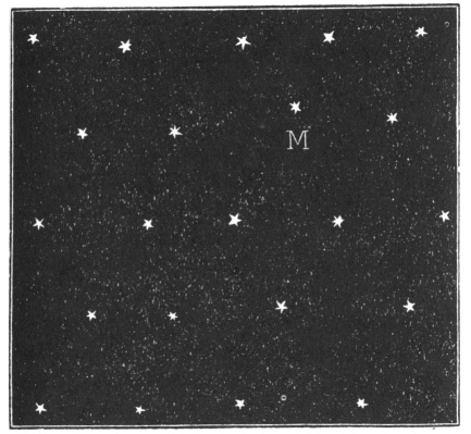 Всесвіт Джордано Бруно (ілюстрація з книги Кеплера Короткий виклад коперниковой астрономії, 1618). Символом M відзначений наш світ.